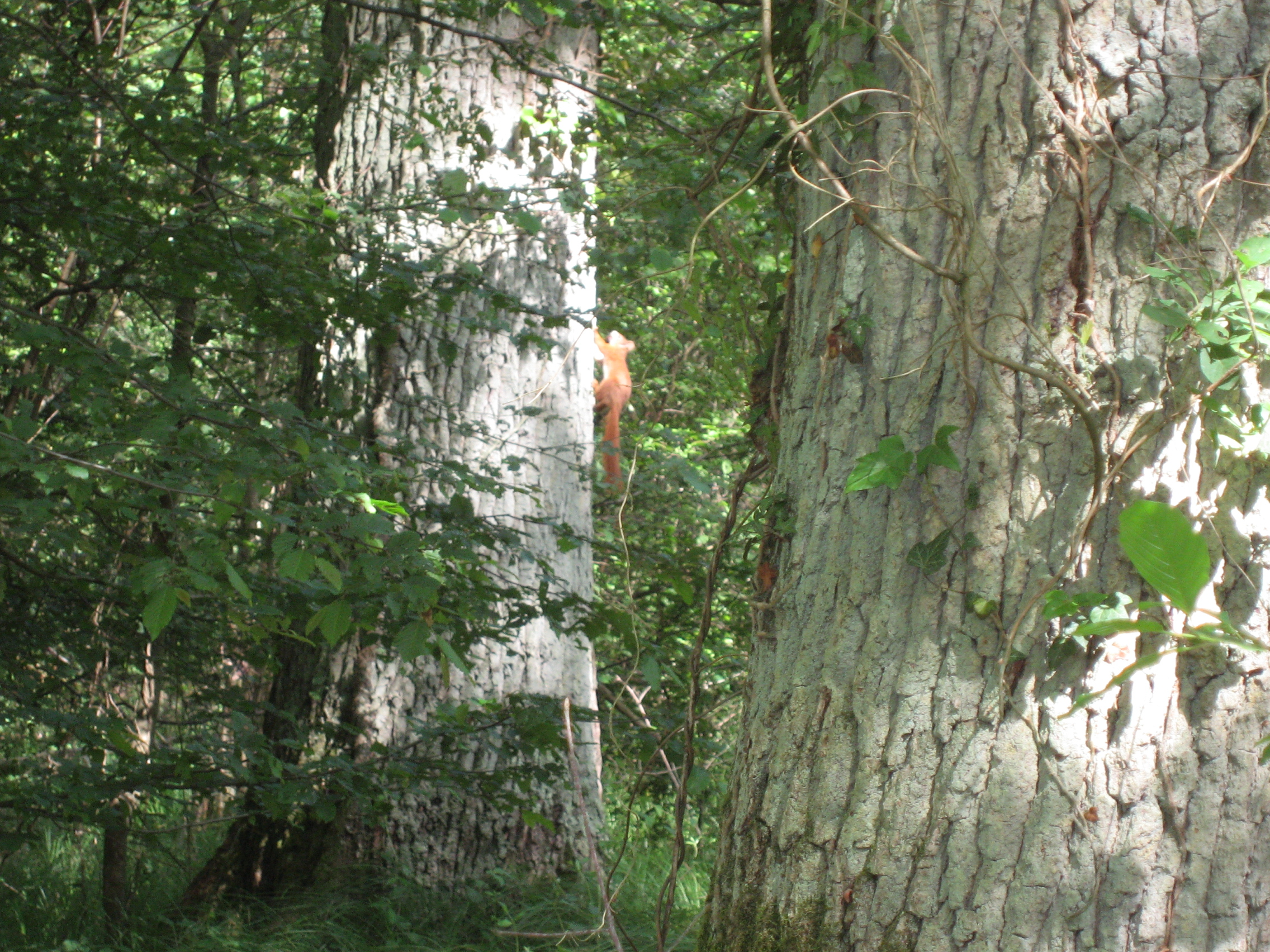 Ecureuil roux, forêt de protecion du Nonnenbruch (Lutterbach, Alsace)